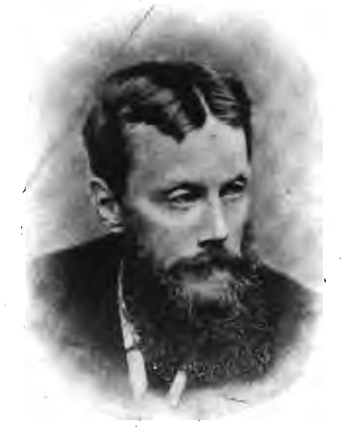 ヒュー・フレイザー駐日英国公使